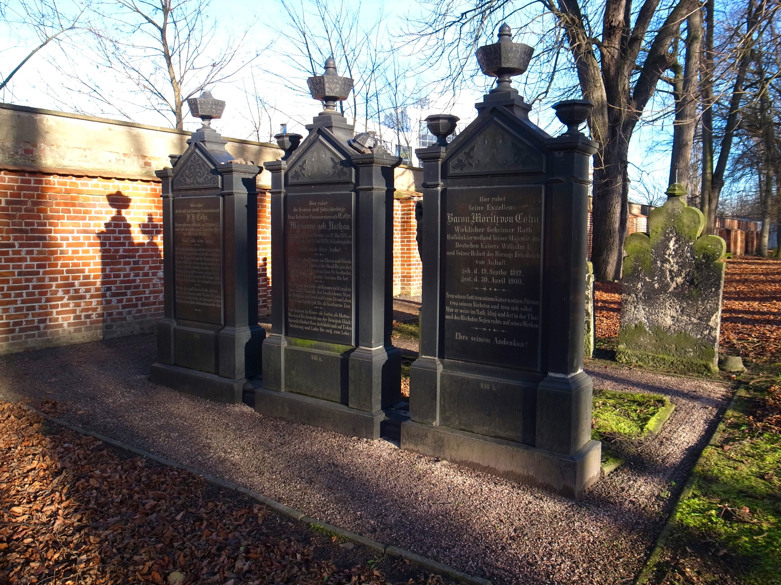 Baron Moritz von Cohn, Ruhestätte in Dessau